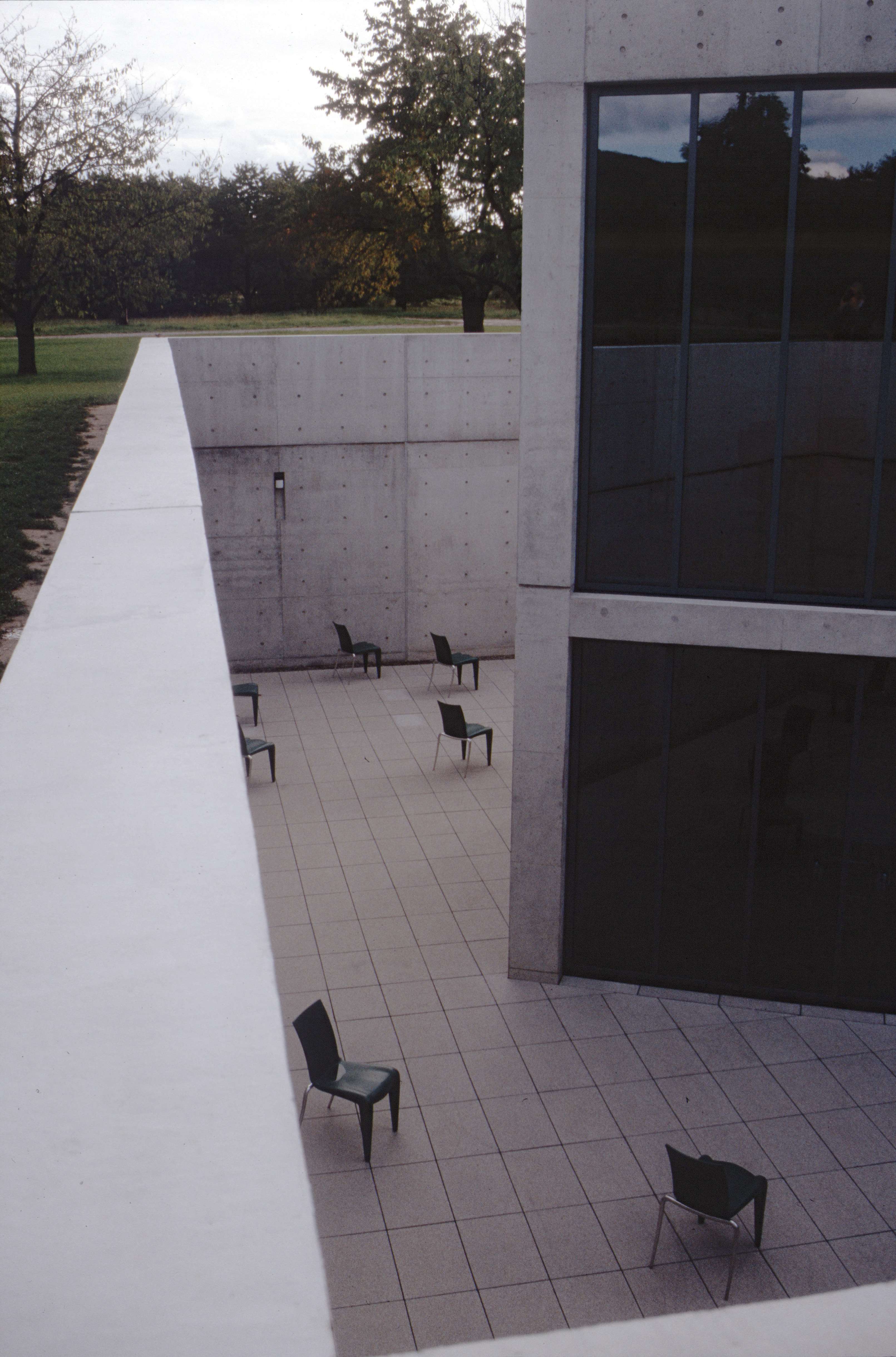 Vitra Konferenz Pavillon in Weil am Rhein